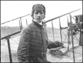 Cei